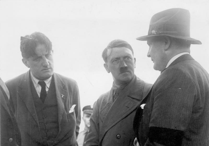 Adolf Hitler, der Führer der Nationalsozialisten im regen Gespräch mit seinen Mitarbeitern, diskutieren die Regierungskrise! Von rechts nach links, Hauptmann Hermann Göring, Adolf Hitler und der Pressechef der Nationalsozialisten Dr. Ernst Franz Hanfstaengl